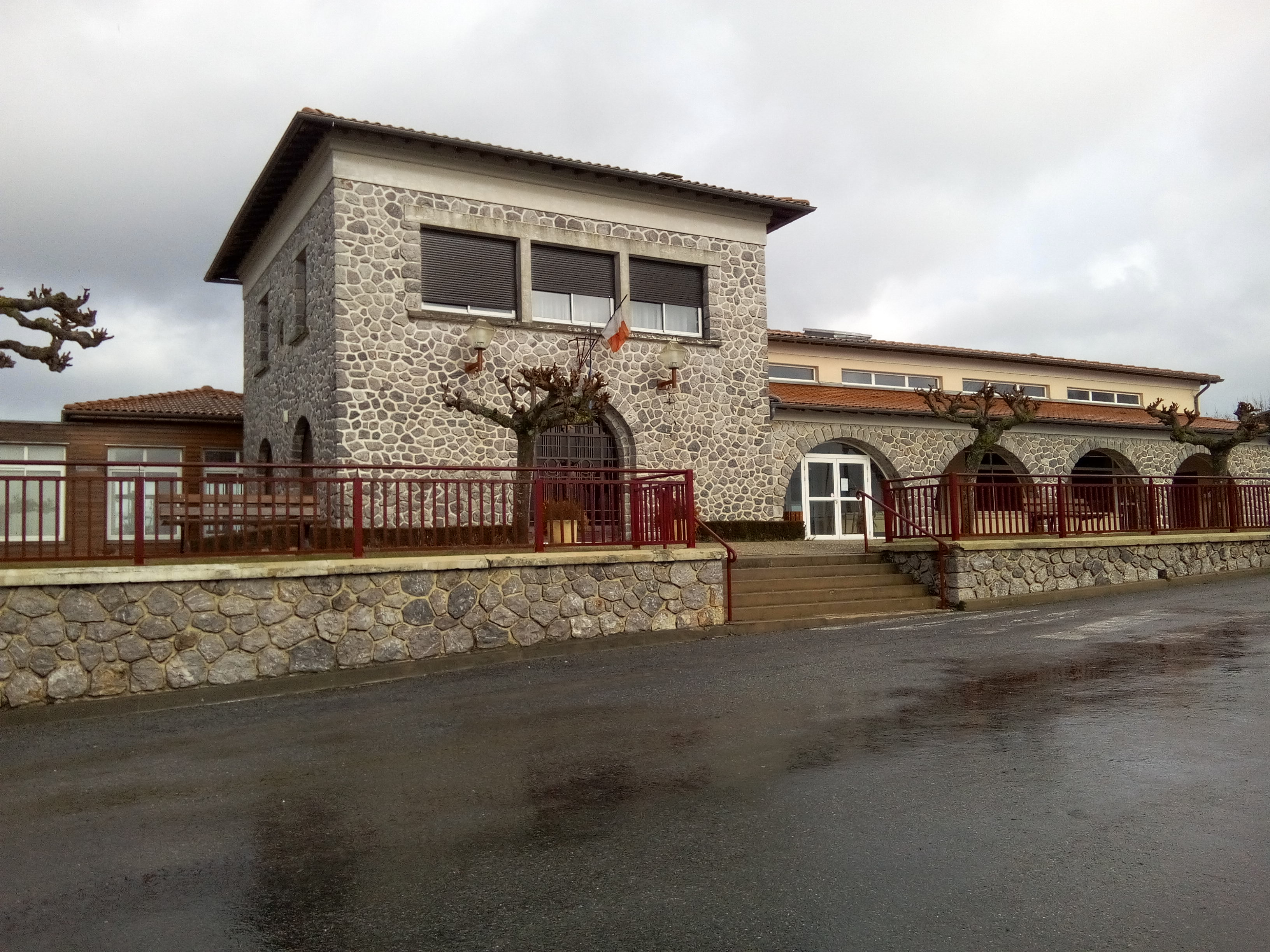 Mairie de Péguilhan